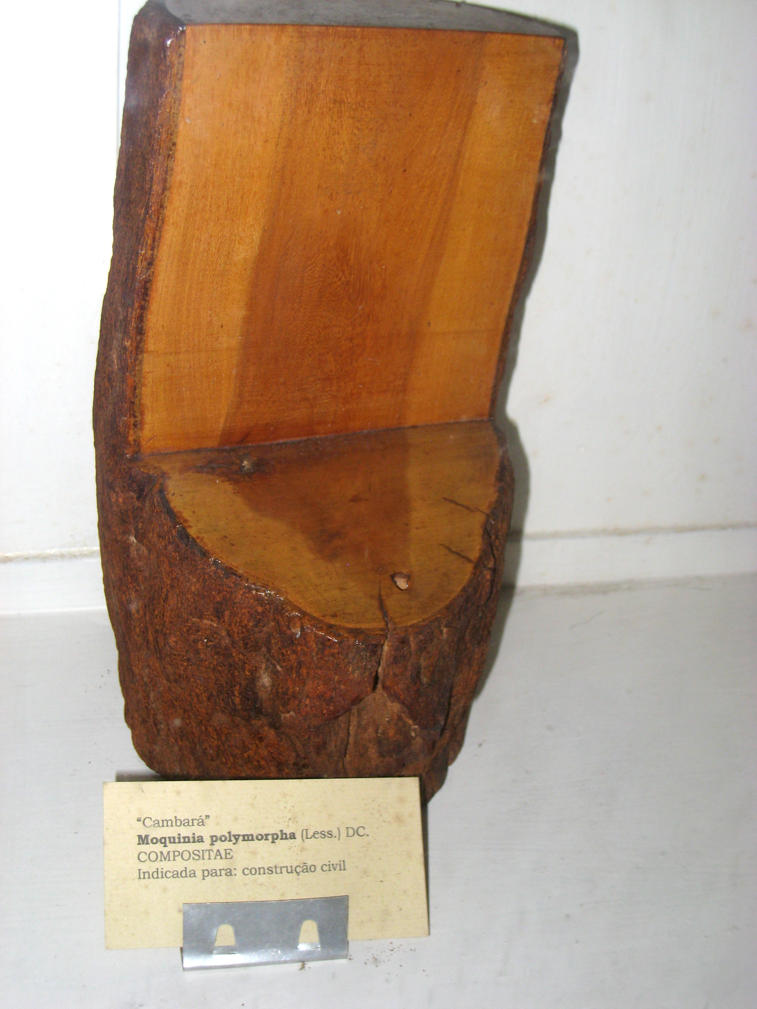 Moquinia polymorpha Less. - now classified as Gochnatia polymorpha (Less.) Cabrera Specimen in the Museu Botânico Dr. João Barbosa Rodrigues, Jardim Botânico de São Paulo, São Paulo City, SP, Brazil.